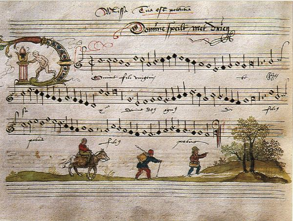 Fragment van een verlucht blad van het liedboek (1542) van Zeghere van Male (bewaard in de bibliotheek van Kamerijk).